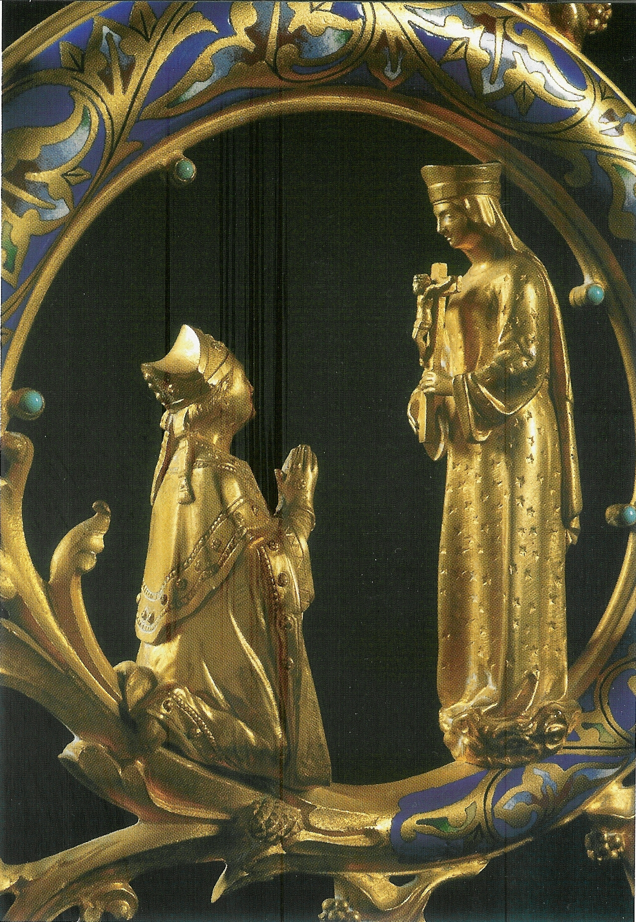 Volute de la crosse de Mgr Le Hardy du Marais (Laval-France), déposée au trésor de la Cathédrale de Tournai (Belgique), et représentant l'évêque à genoux devant ND de Pontmain.